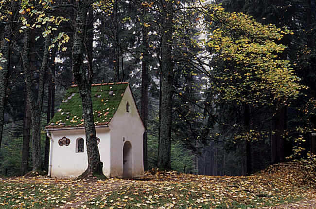 Waldkapelle "Alter Herrgott" Fotograf: Walter J. Pilsak, Waldsassen Copyright Status: GNU Freie Dokumentationslizenz